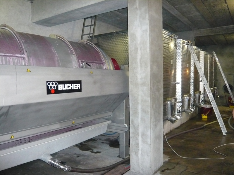 Chénas (Rhône) en 2008.